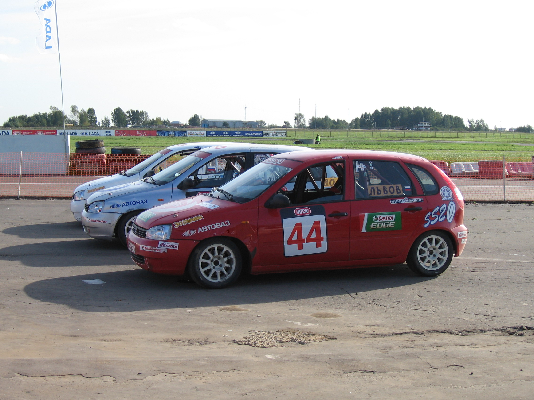 lada kalina sport moscow ring